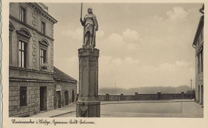 Nieistniejący pomnik Hermanna Balka w Kwidzynie